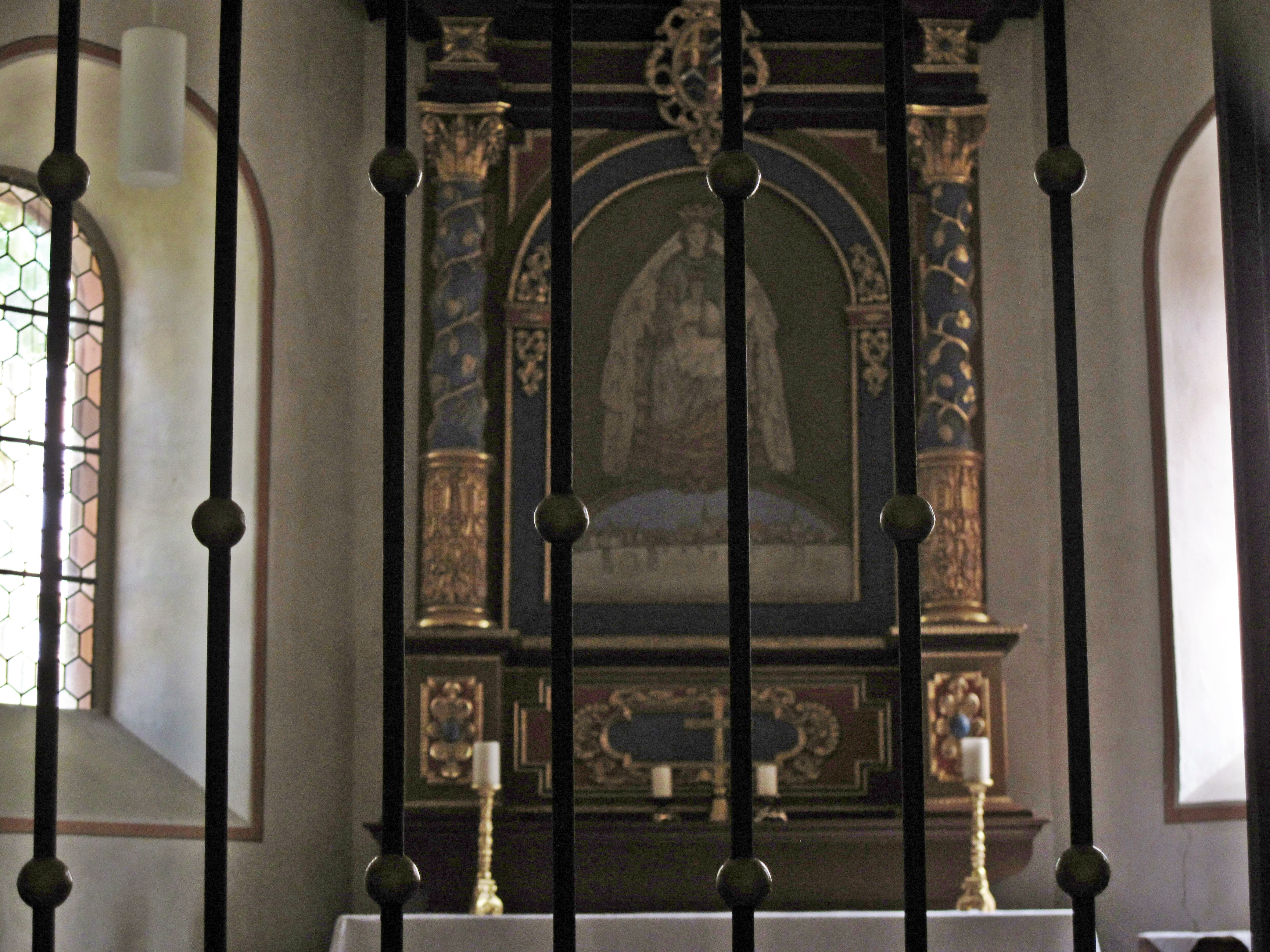 Werl, Kapelle auf der Gänsevöhde, Innenansicht